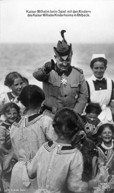 Kaiser Wilhelm beim Spiel mit den Kindern des Kaiser Wilhelm Kinderheims in Ahlbeck. phot. A. Grohs, Berlin 4247 Verlag von Gustav Liersch & Co. Berlin, SW